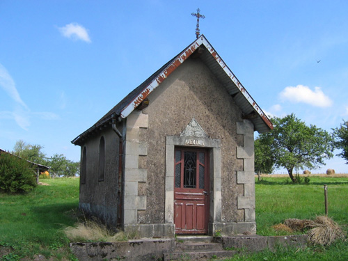 Chapelle Notre Dame de La Chapelle aux Bois (88)